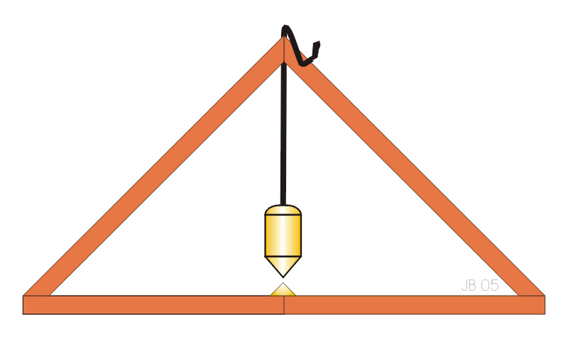 Schema für eine antike Setzwaage